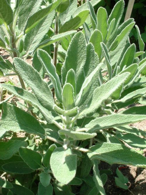 sauge candélabre (salvia candelabra); grande perspective, Jardin des Plantes, Paris